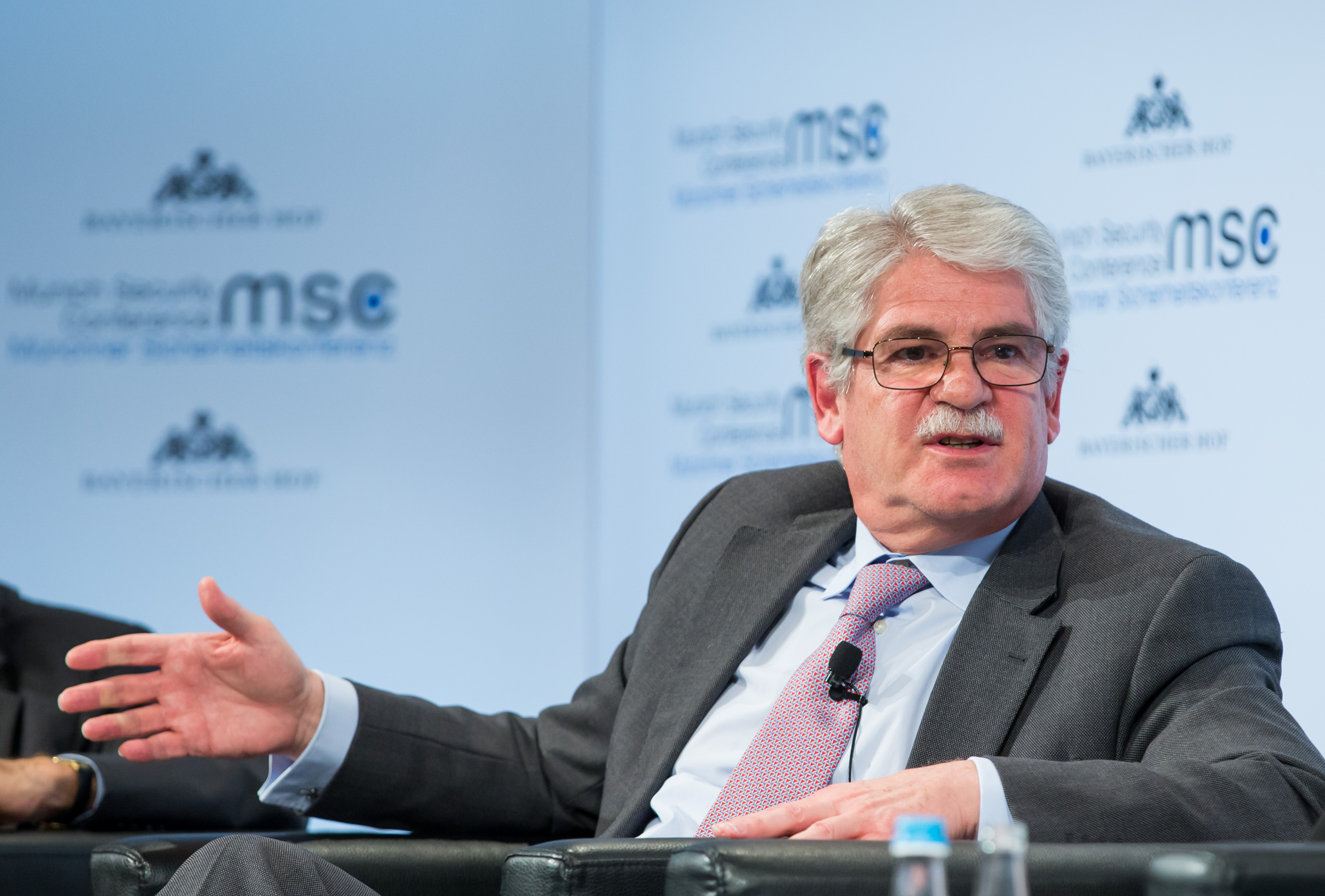 Alfonso María Dastis während der Münchener Sicherheitskonferenz 2018